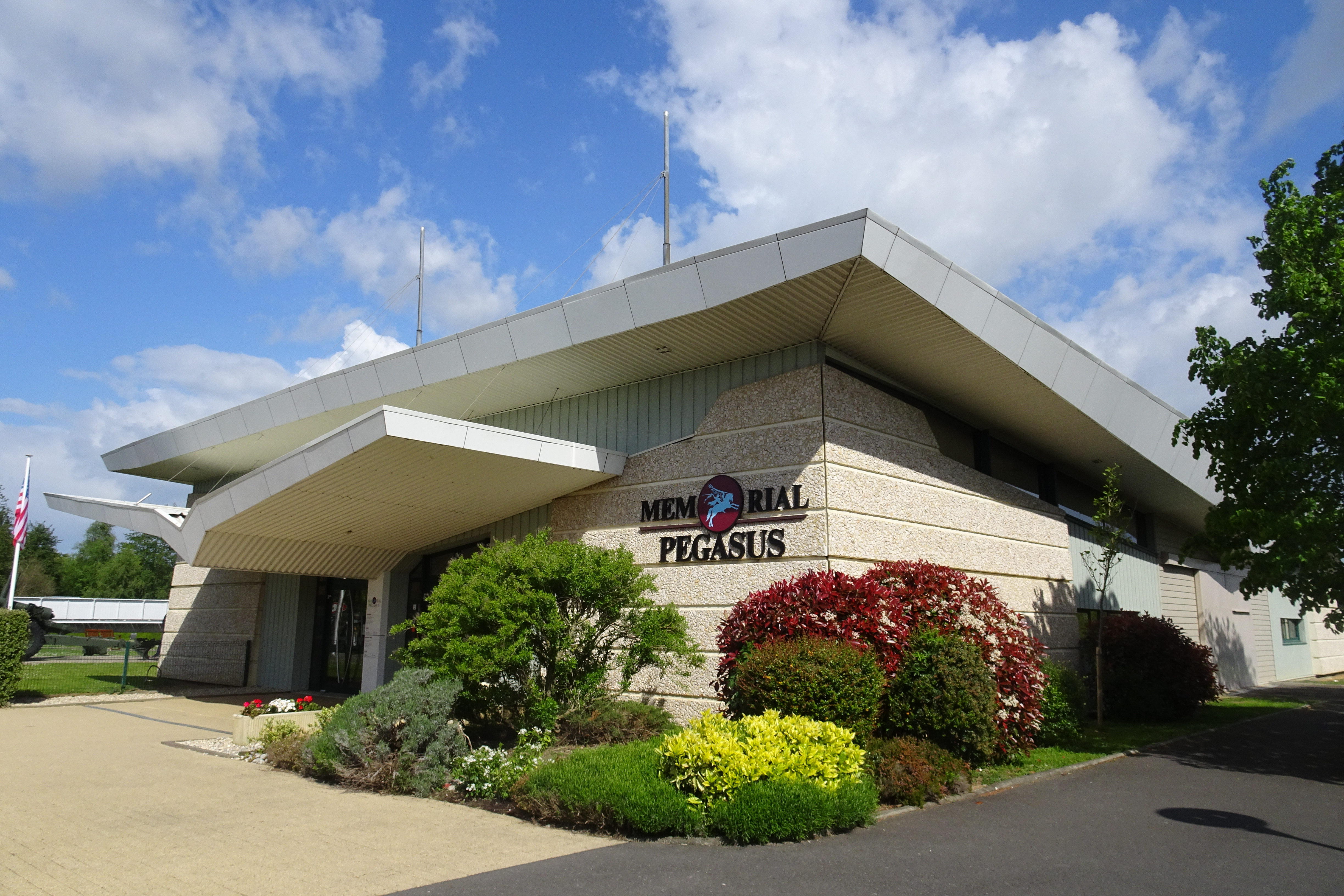 Memorial Pegasus - Entrée du musée